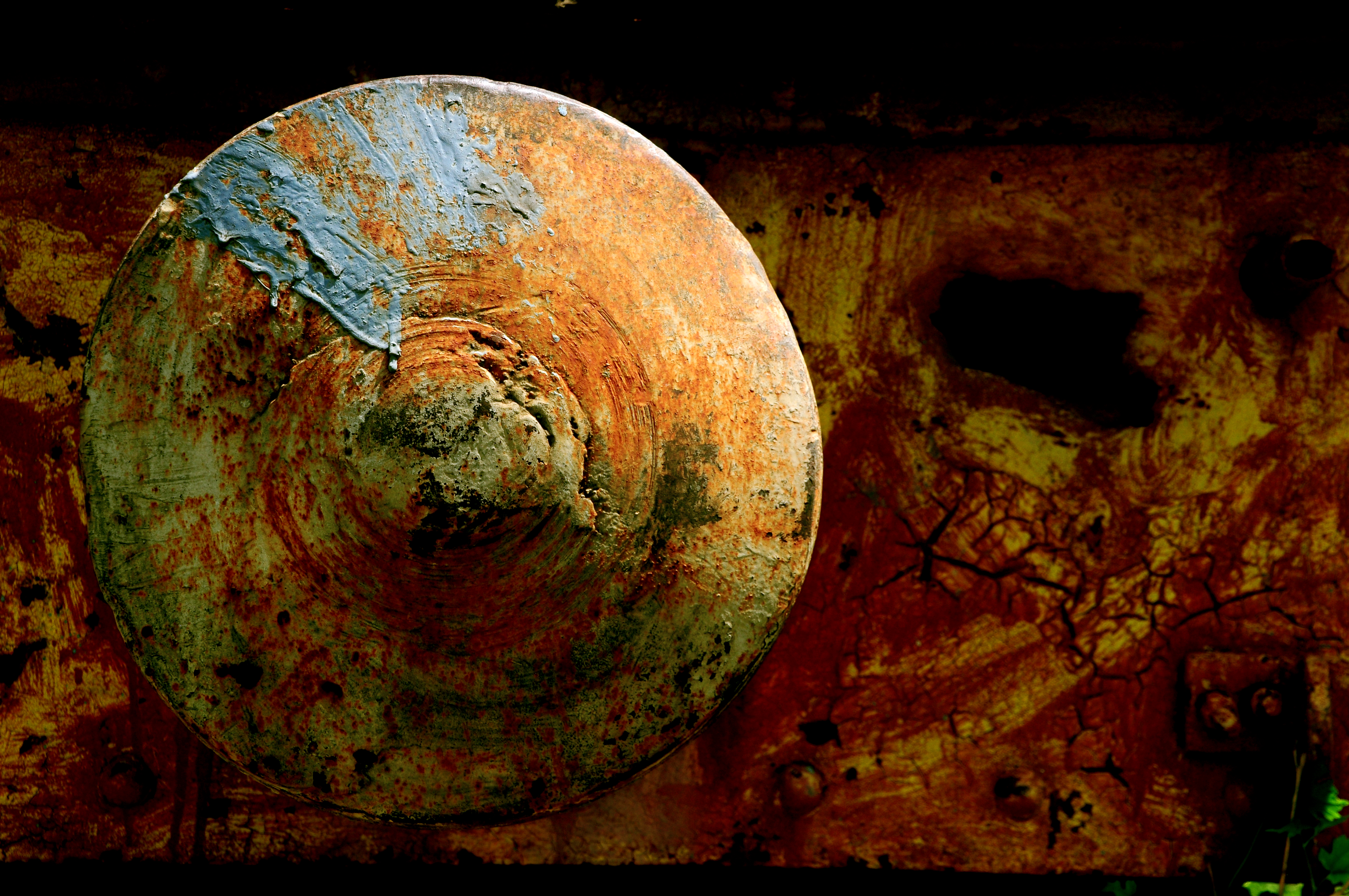 17624 Rustavi